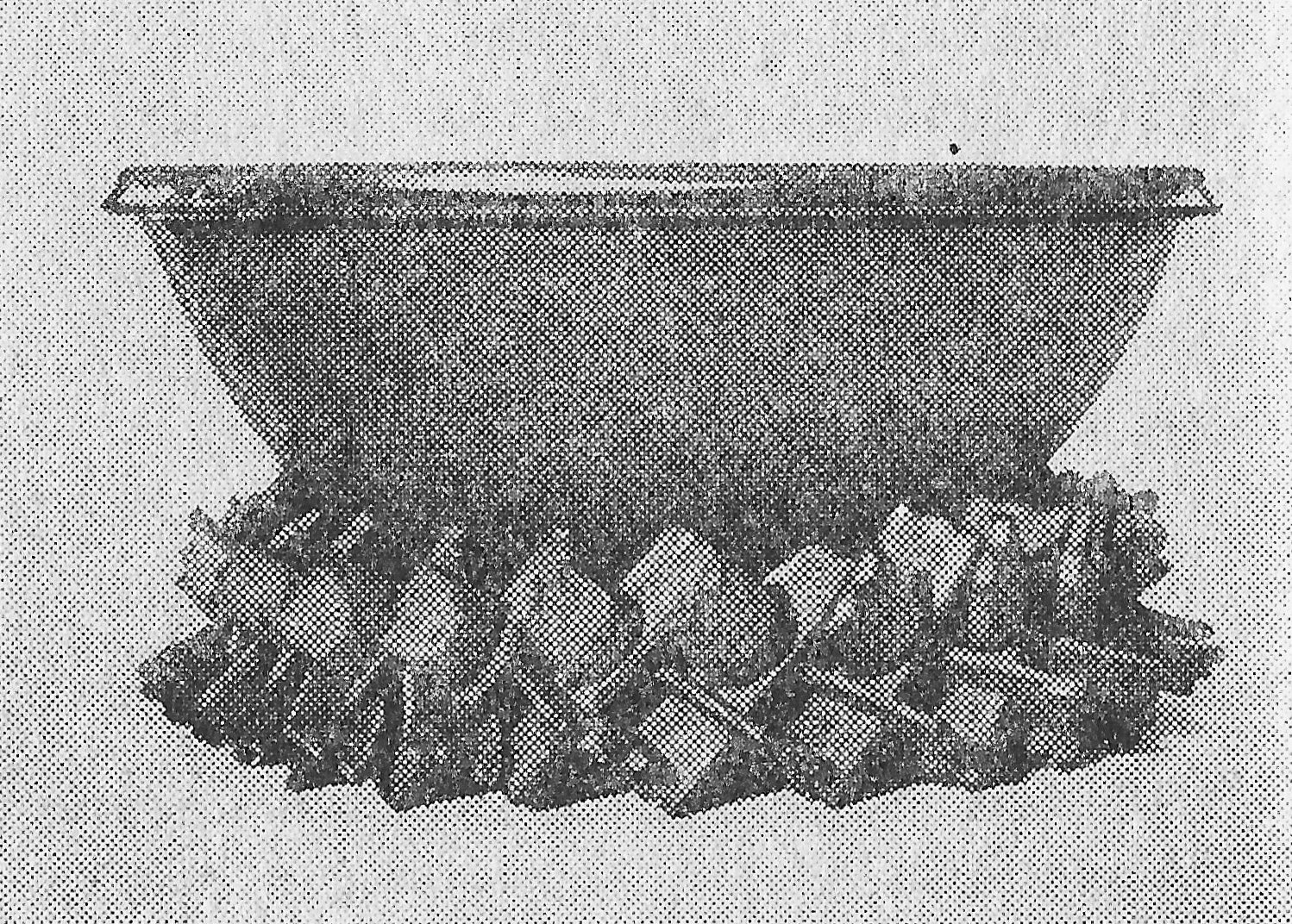 Schöttelkranz (Museum des Heimat- und Altertumsvereins im Kreise Jerichow I, Burg bei Magdeburg), 1935 oder früher, Das Bild wurde 1935 im Buch von Eduard Stegmann, Aus dem Volks- und Brauchtum Magdeburgs und der Börde, Magdeburger Kultur- und Wirtschaftsleben Nr. 4, Herausgegeben von der Stadt Magdeburg, Seite 48 veröffentlicht.